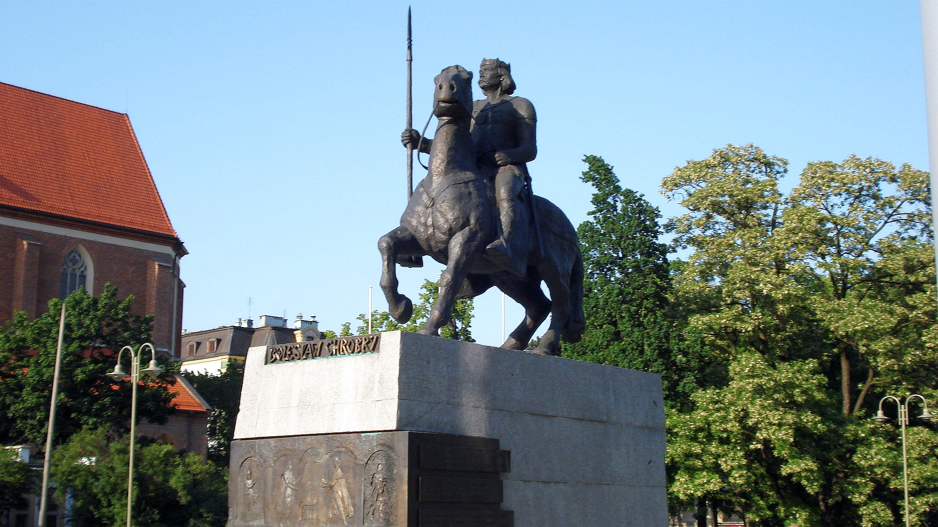 Wrocław